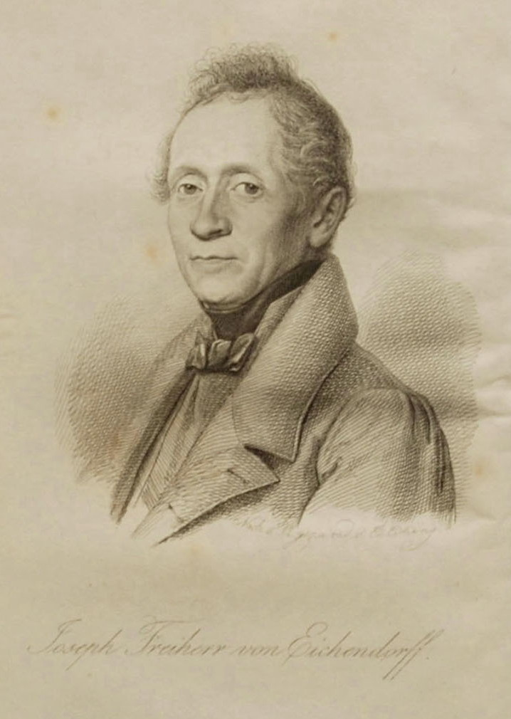 Radiertes Porträt Eichendorffs 1841 (120 x 80 mm) in feiner Strichführung, gezeichnet und radiert von Eduard Eichens (1804 - 1877), einem der bedeutendsten deutschen Stecher seiner Zeit (THIEME-BECKER).